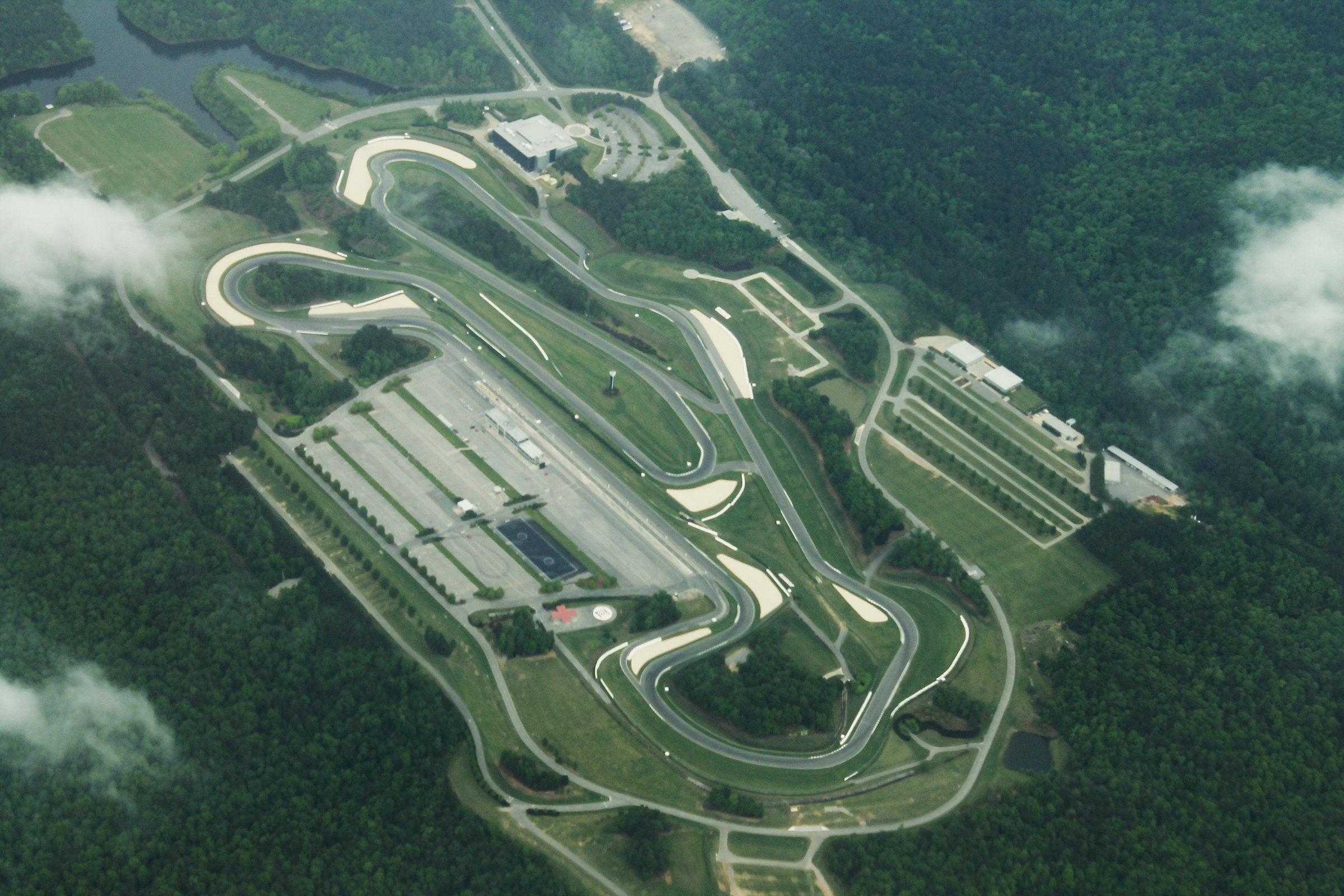 Barber Motorsports Park Aerial